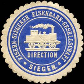 Siegelmarke der Eisern-Siegener Eisenbahn-Gesellschaft